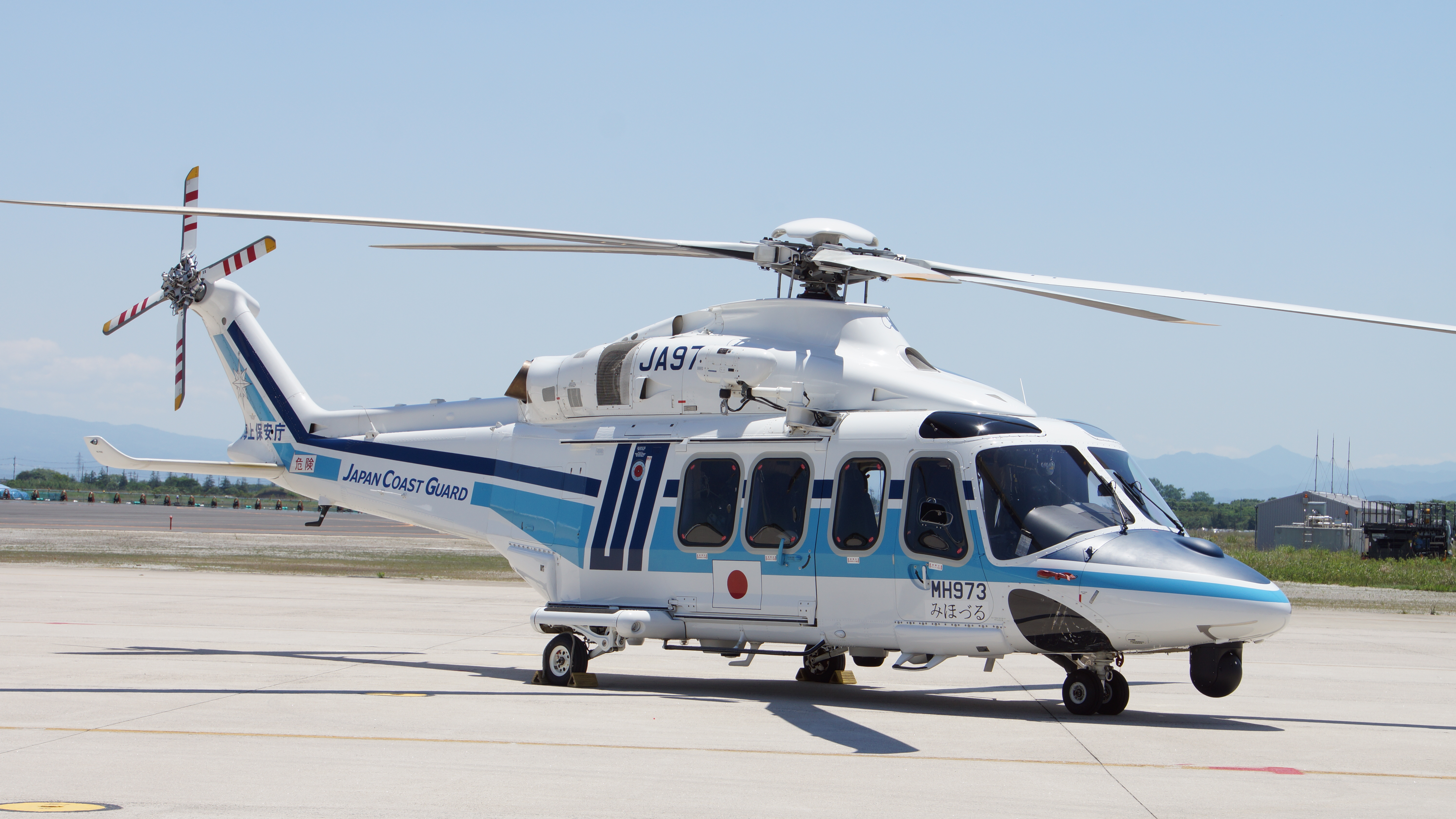 海上保安庁 アグスタウエストランドAW139ヘリコプター（JA973A・MH973 ”みほづる2号”） 右前面。2017年5月28日 航空自衛隊美保基地にて。